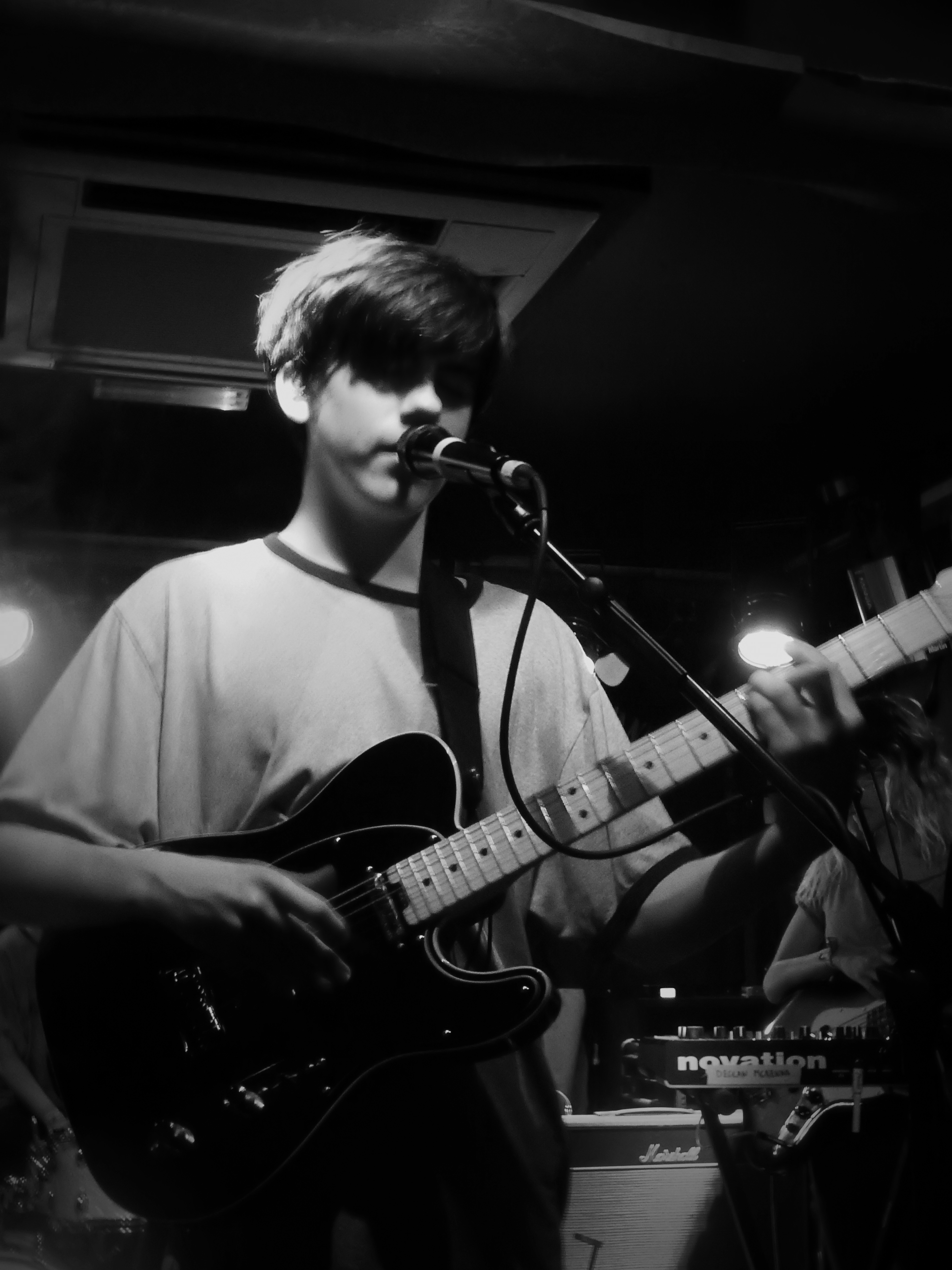 Declan McKenna, Boileroom, Guildford